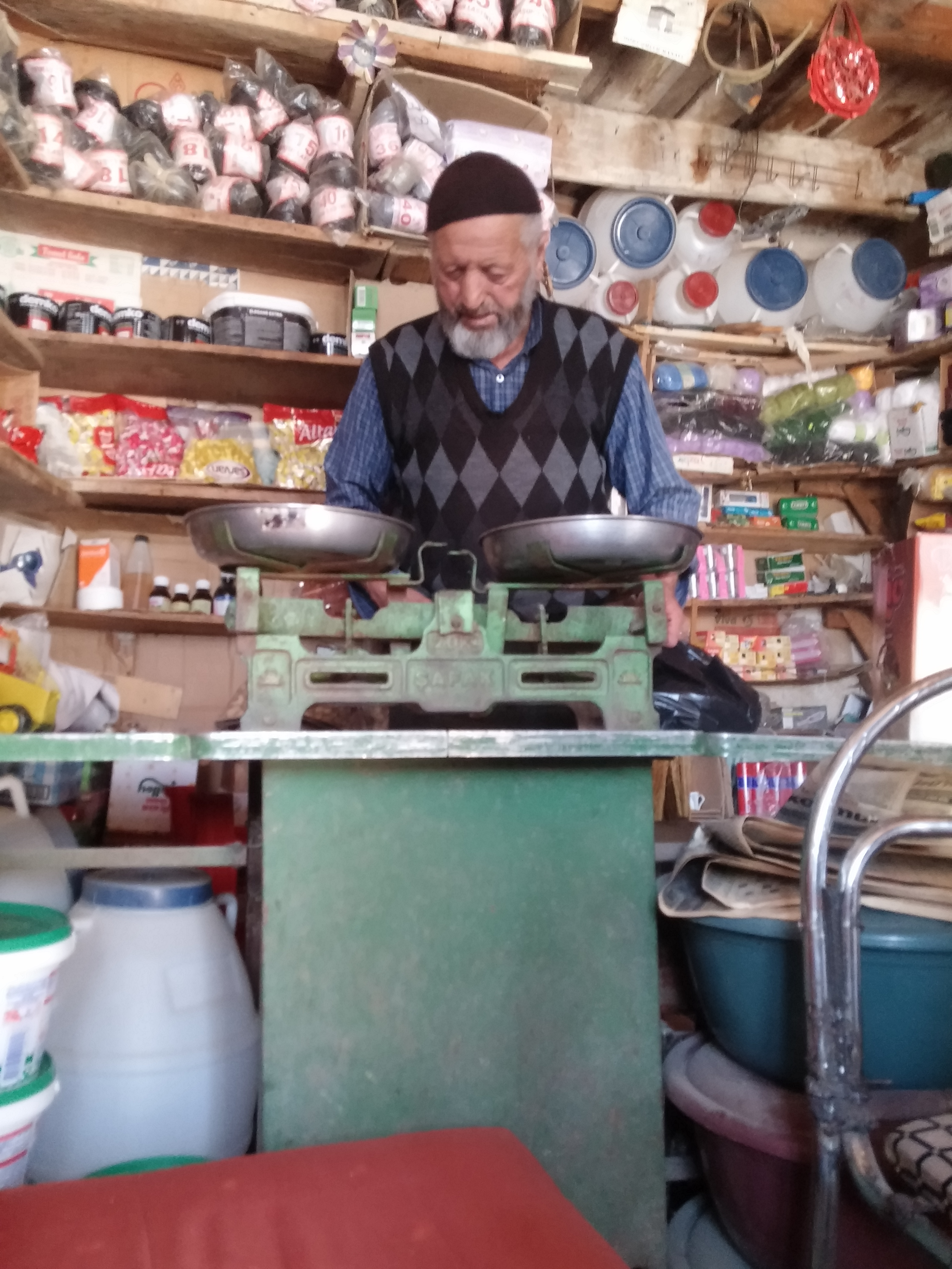 Bakkal